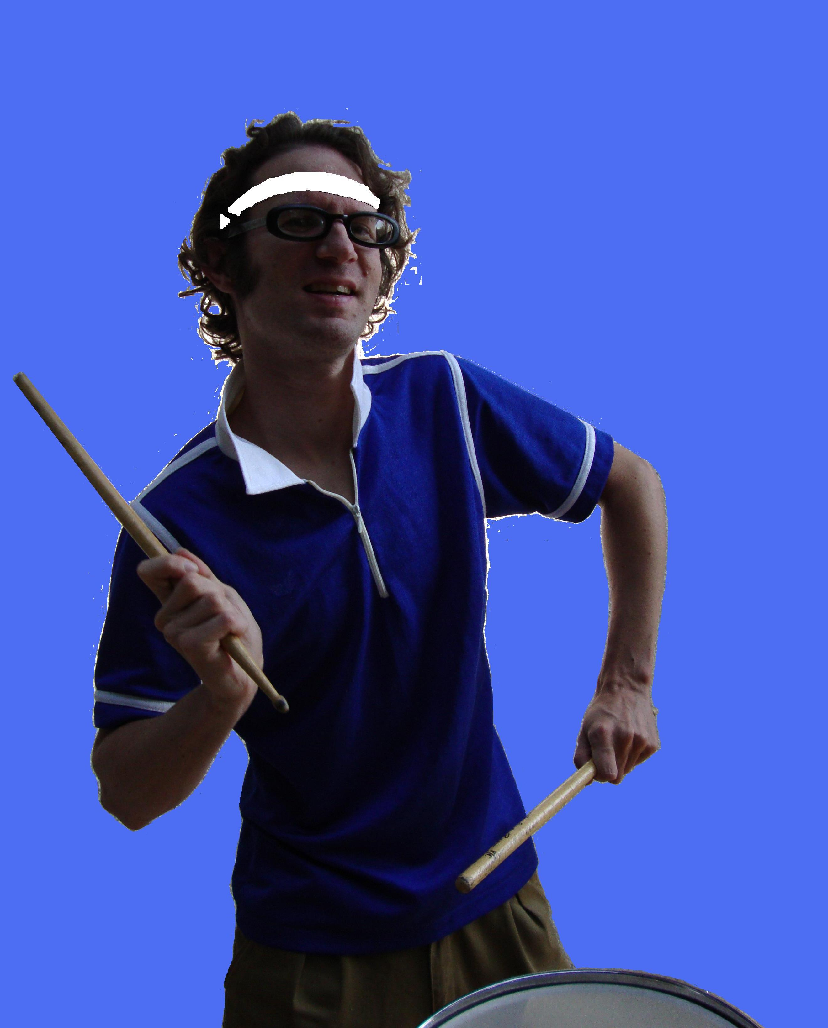 Tromla